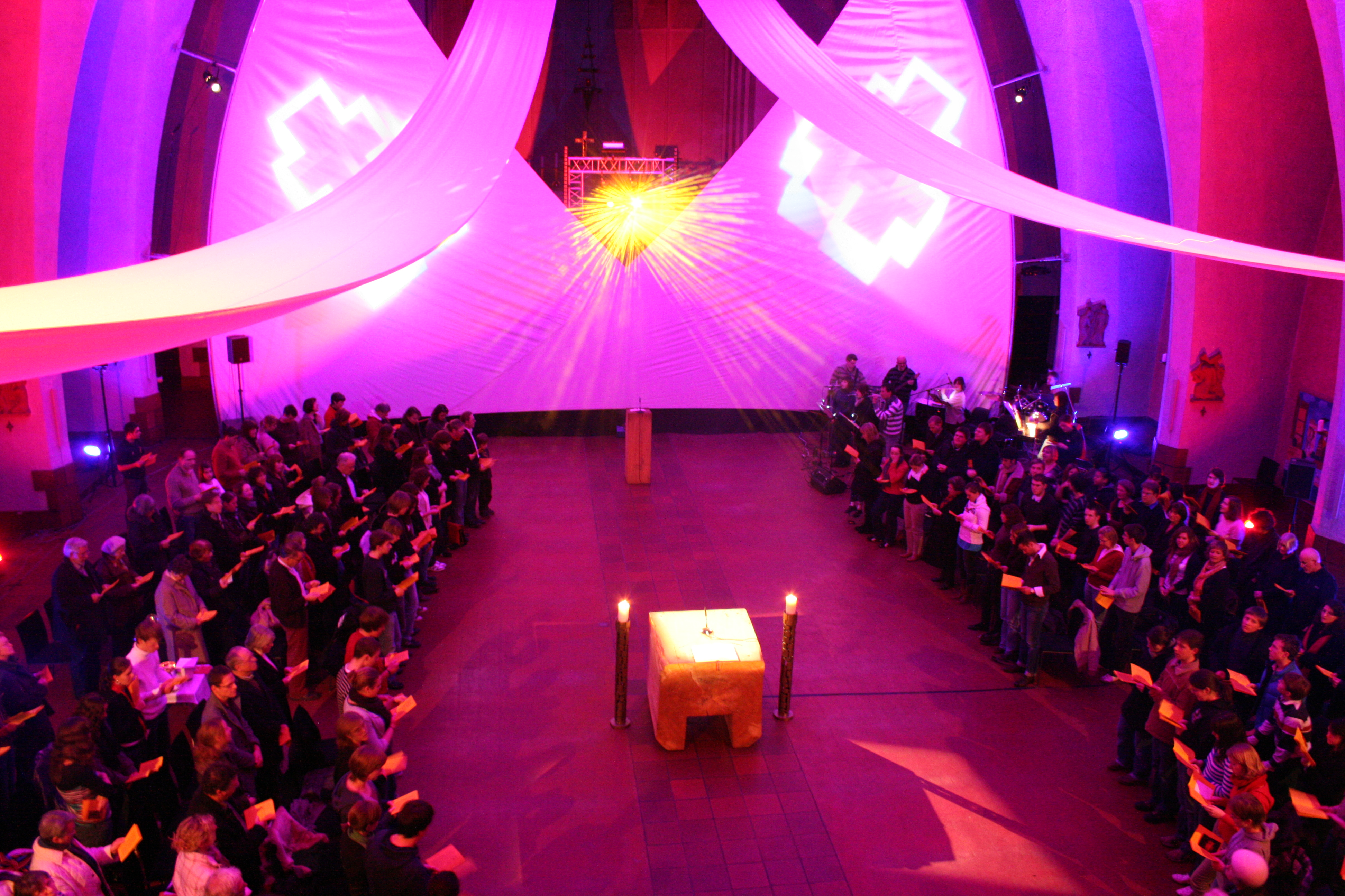 Gottesdienst in der Kath. Jugendkirche JONA (in St. Bonifatius), Frankfurt am Main